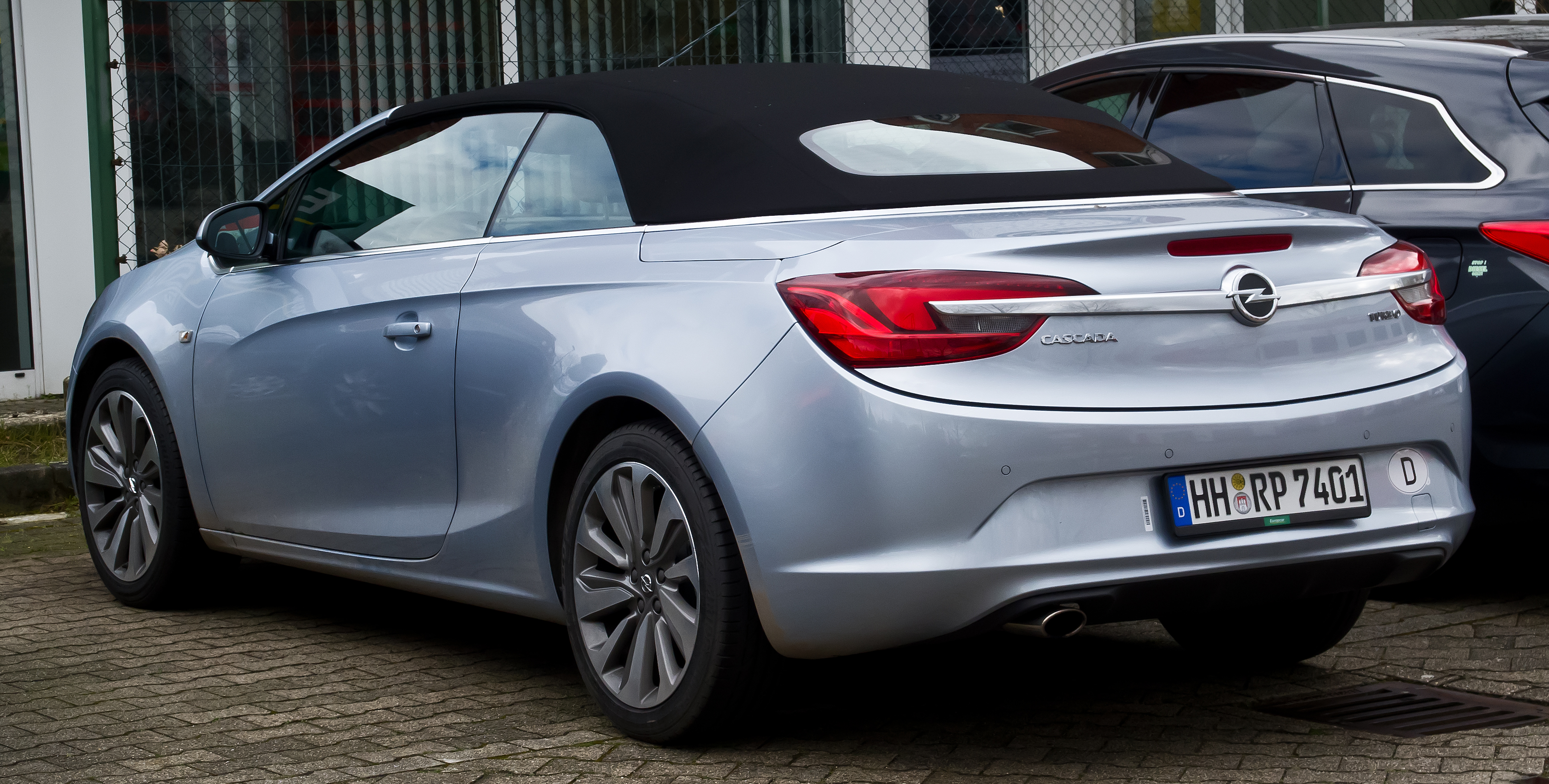 Opel Cascada 1.6 EDIT Innovation